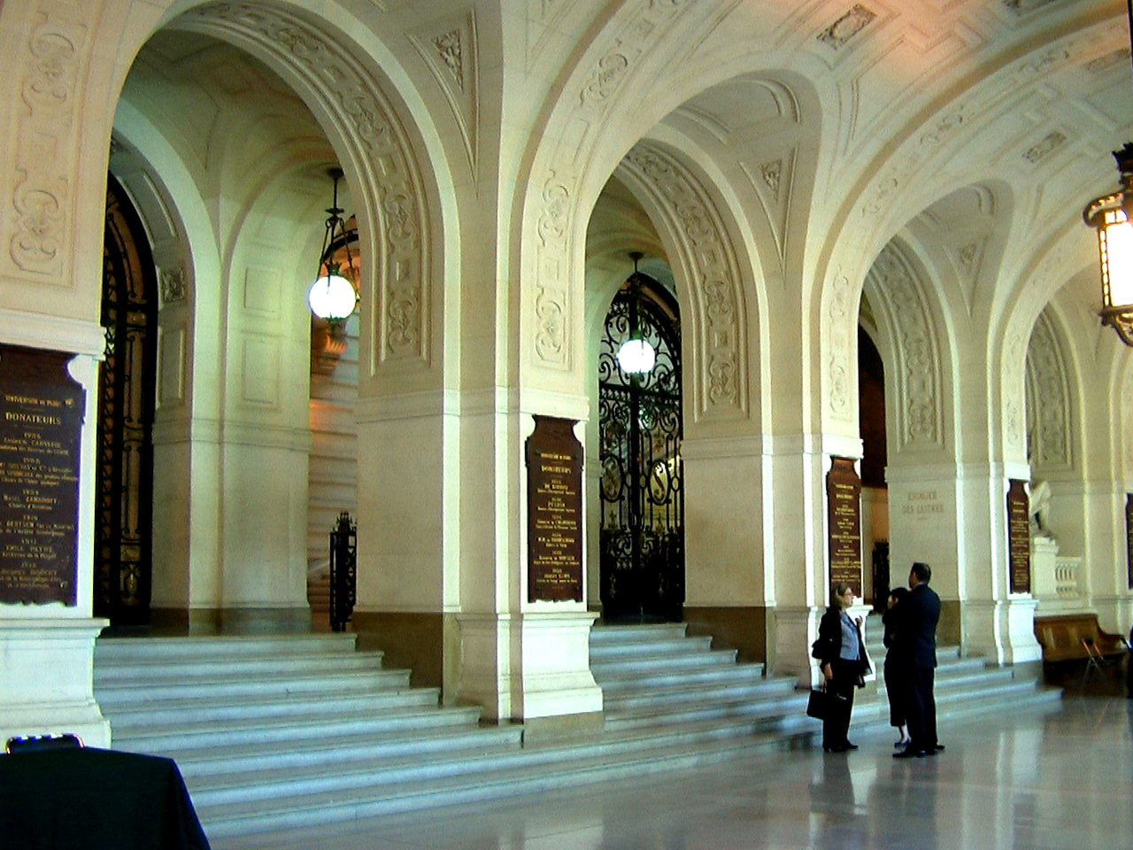 À La Sorbonne.